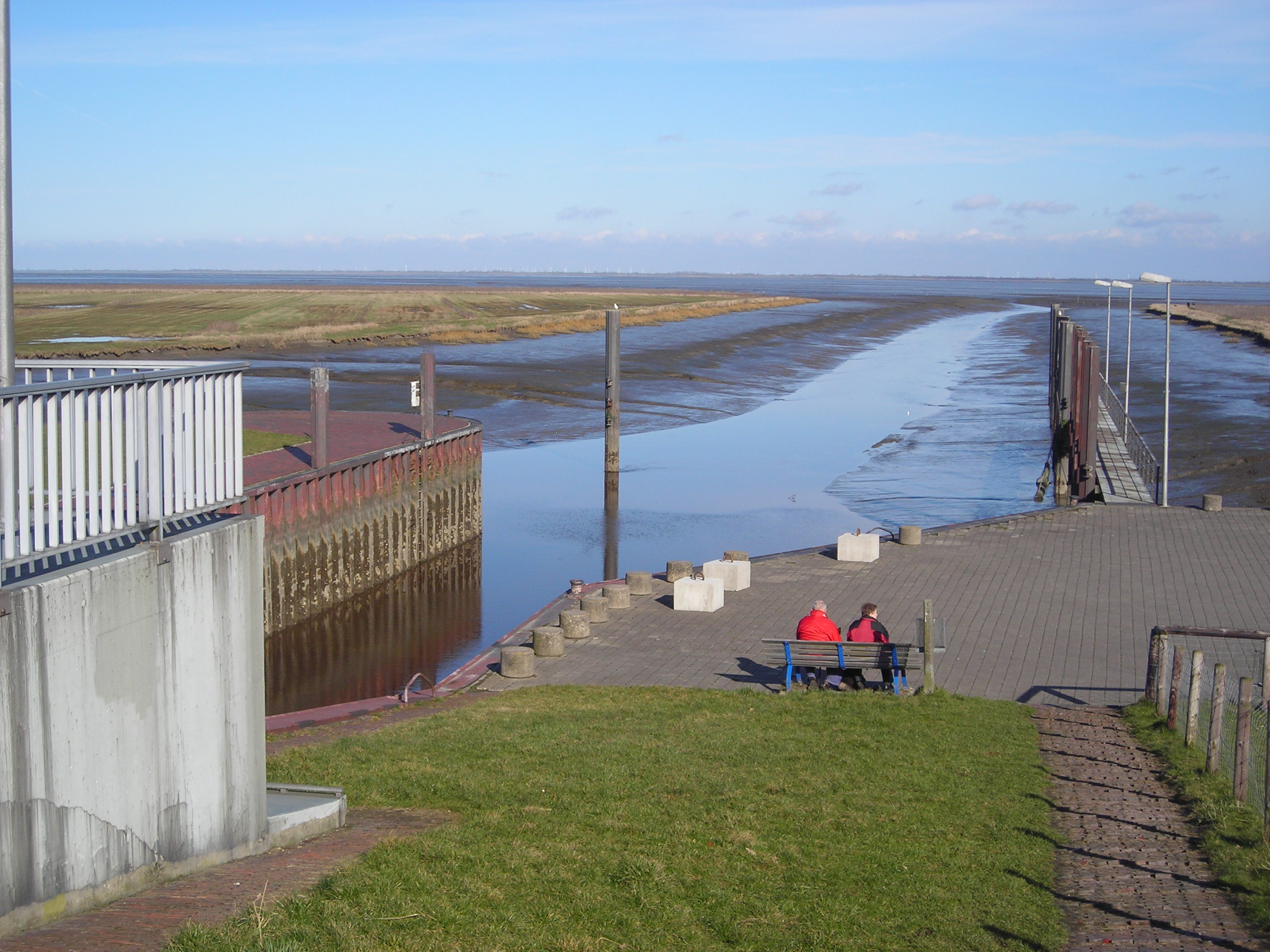 Blick von der Vareler Sielschleuse auf den Jadebusen bei Niedrigwasser